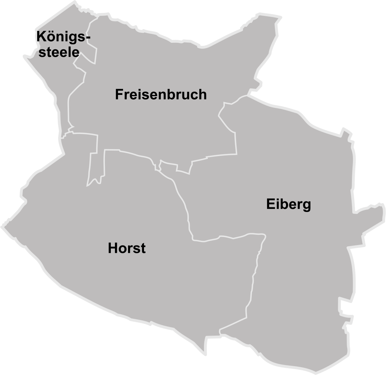 Übersichtskarte der ehemaligen Gemeinde Königssteele in Deutschland nach dem Zusammenschluss im Jahre 1919 mit den Gemeinden Eiberg, Freisenbruch und Horst und zur neuen Großgemeinde Königssteele